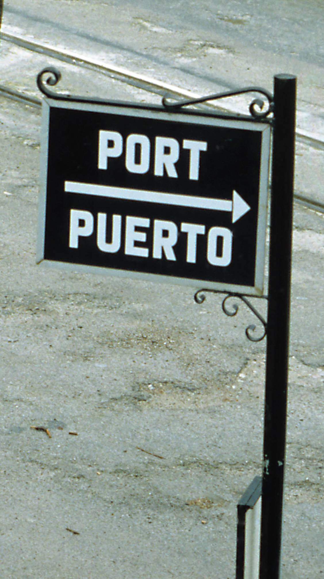 Port →